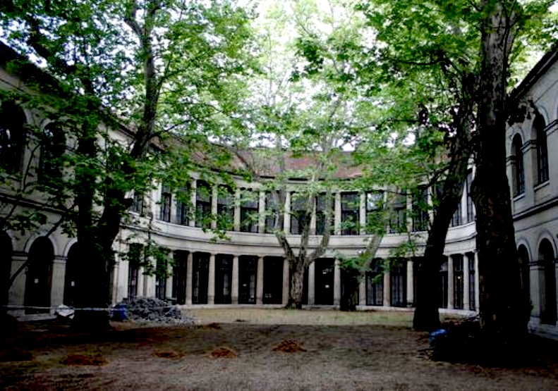 Budapest II., Császár fürdő udvara